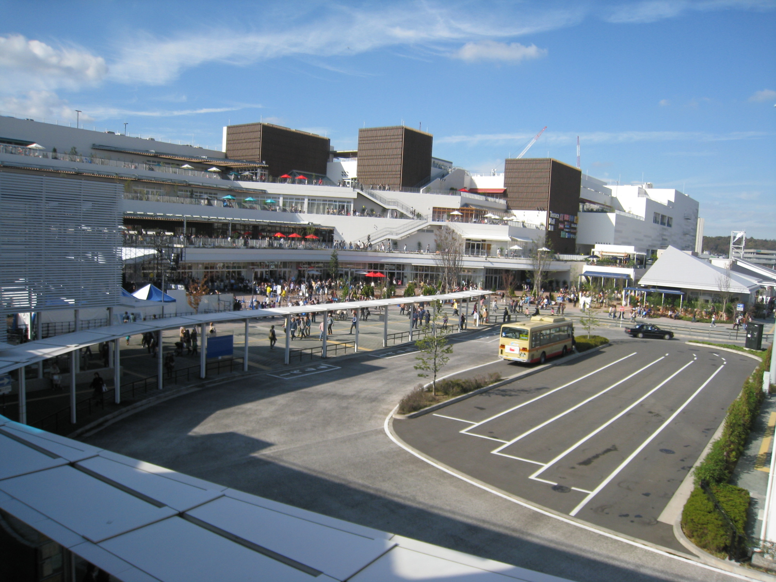 テラスモール湘南・辻堂駅北口バスターミナル側